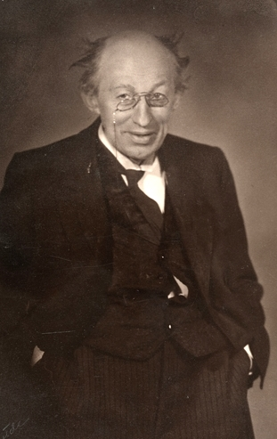 portrett, mann, skuespiller, rollebilde, Doktor Relling i "Vildanden" på Det Nye Teater, stående halvfigur, kostyme.